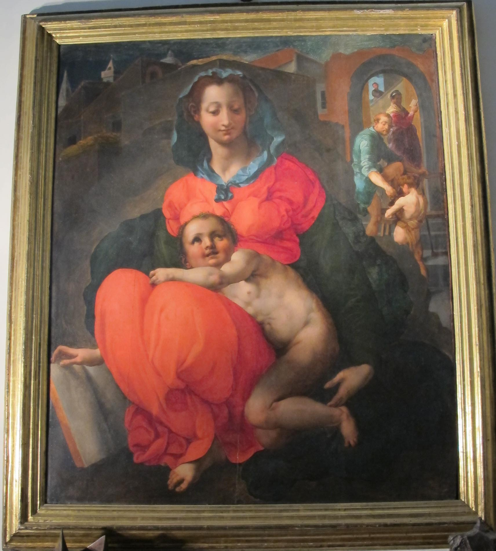 Copia da Pontormo, Madonna del libro